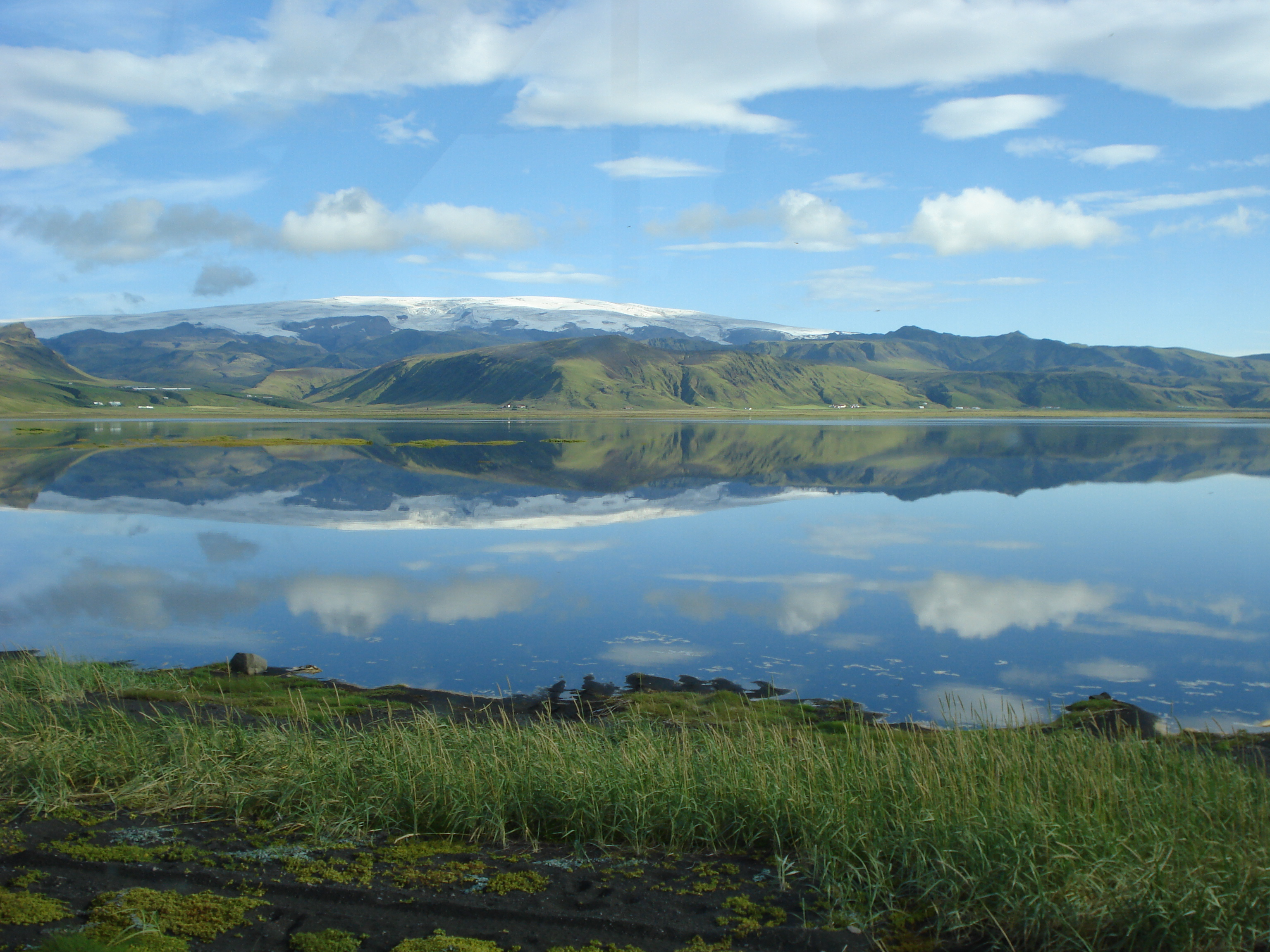 Mýrdalsjökull, Iceland